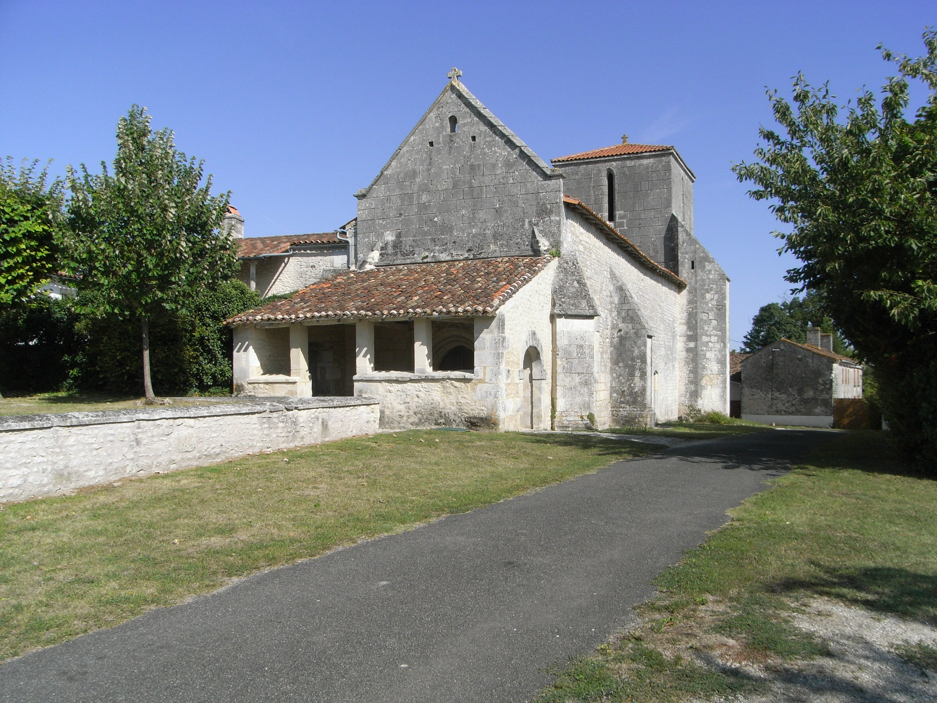 Église de Saint-Sever-de-Saintonge en Charente-Maritime.